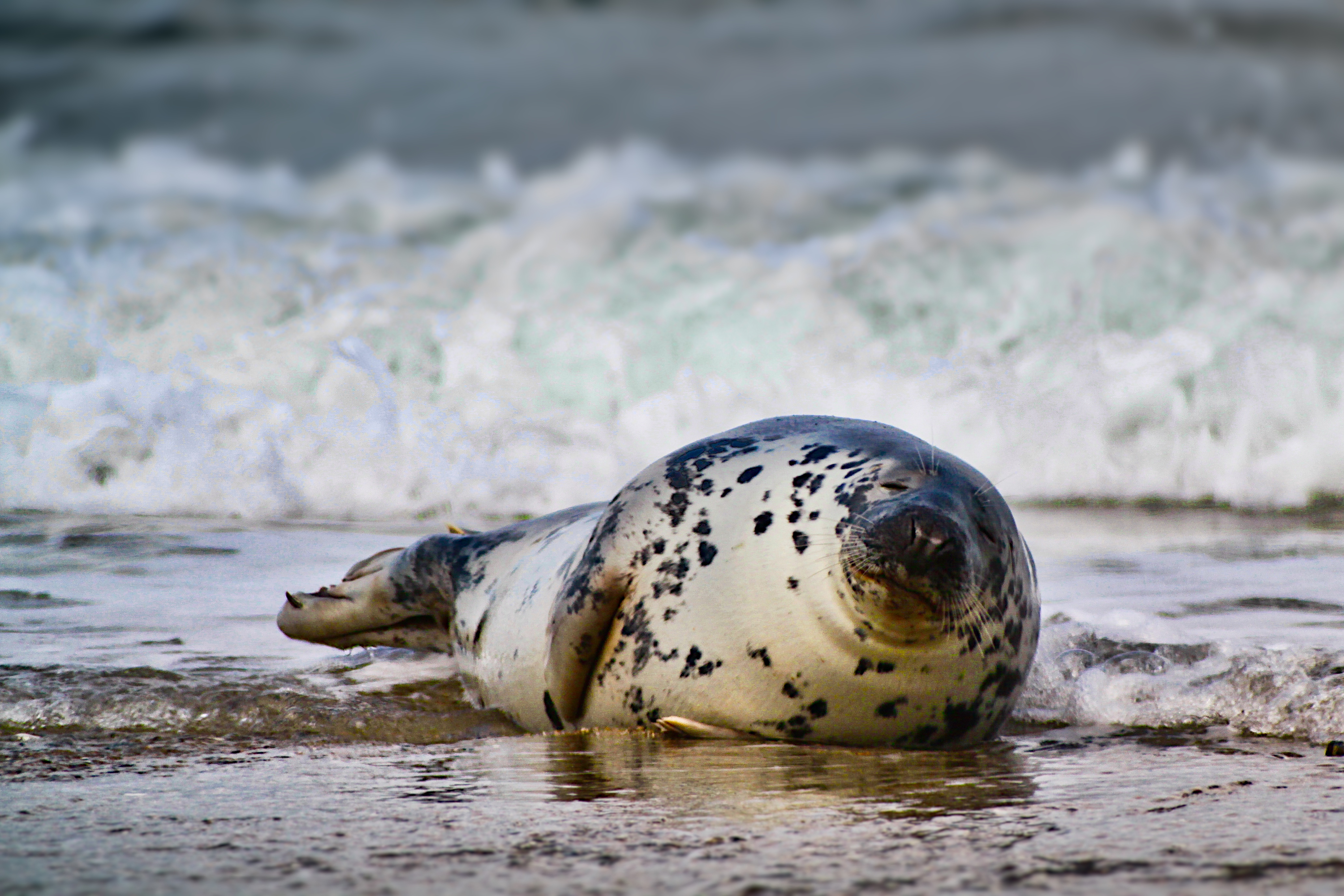 Kegelrobbe auf der Helgoland Düne